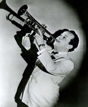 Henry Busse